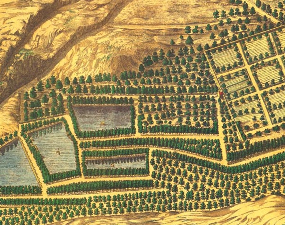 Fragmento de la Casa de Campo en el Plano de la villa de Madrid, dibujado por Pedro Teixeira Albernaz en 1656, por encargo de Felipe IV de España. Se identifican sus calles, plazas y edificios, muchos señalados con sus nombres. El plano está realizado en perspectiva caballera, de sur a norte. Está grabado en 20 planchas de 45x56 cm cada una, midiendo 2,85 x 1,80 metros, a una escala de 1:1.800.